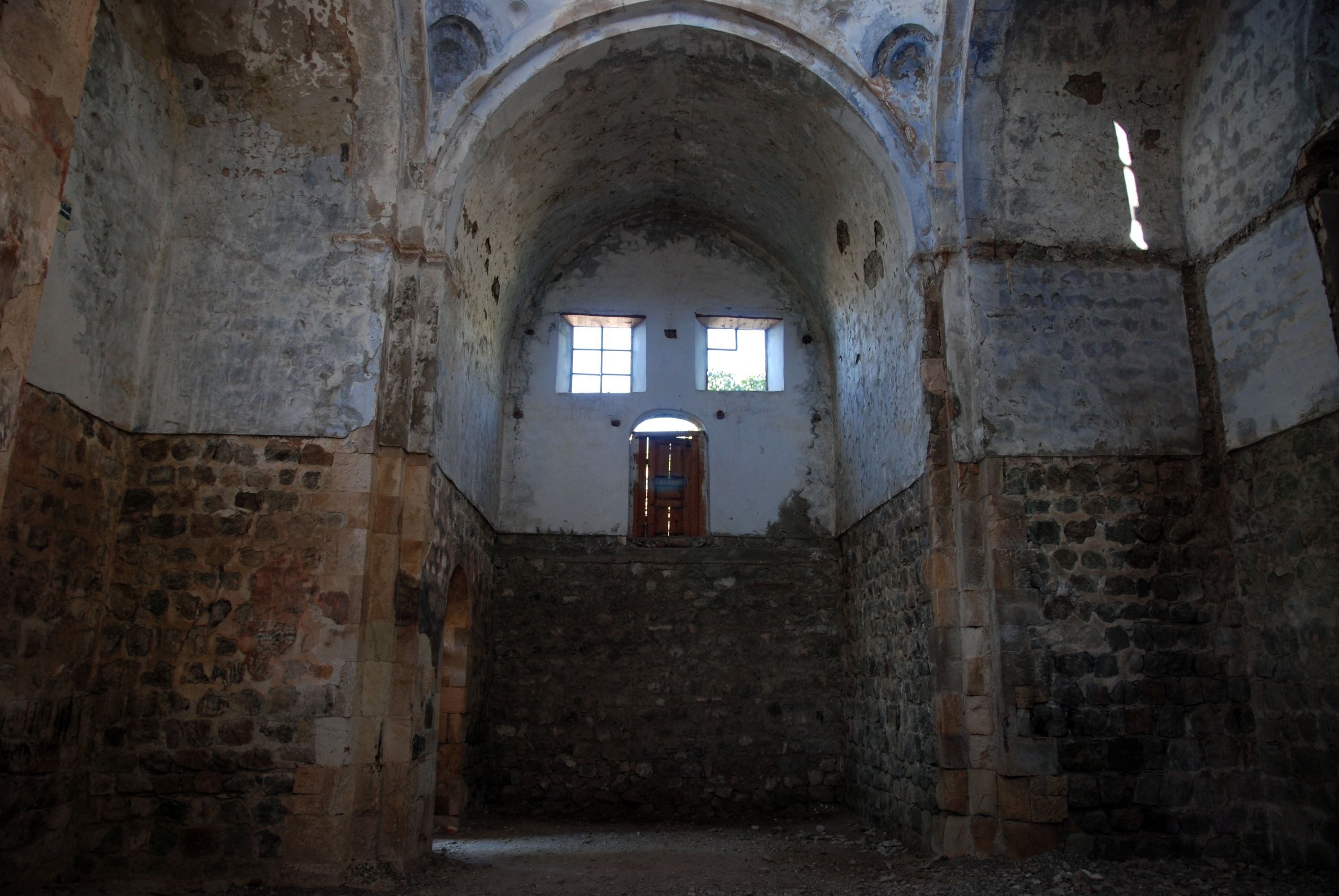 Doliskana church in Hamamlıköy village, west part